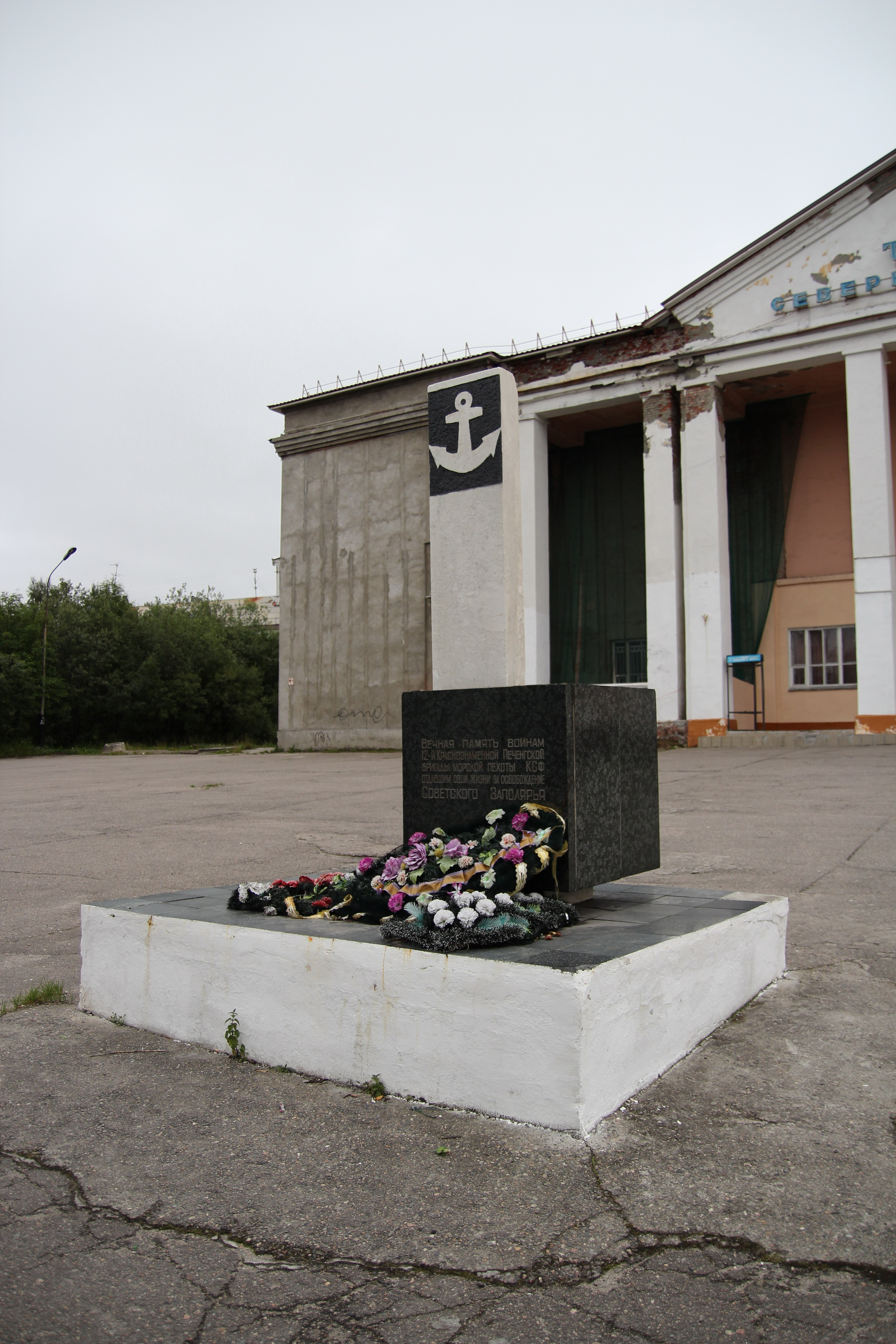 Памятник воинам 12-й Краснознамённой Печенгской бригады